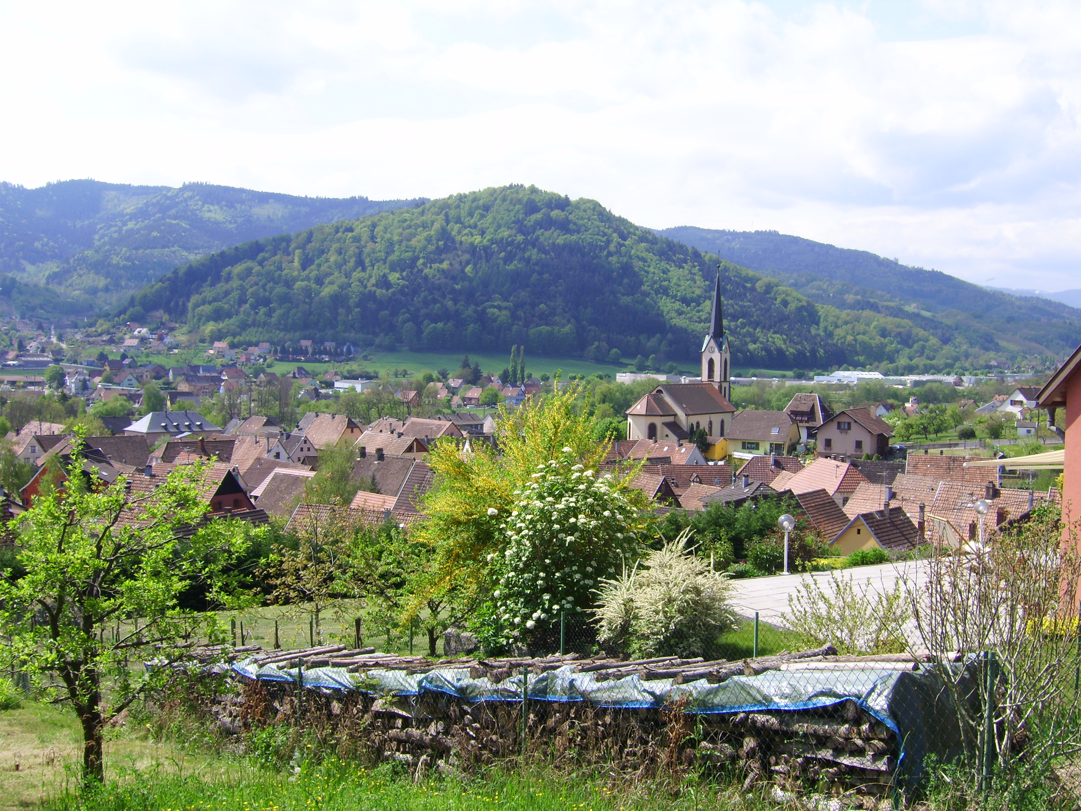 Blick auf den Ort Gunsbach, Deutschland